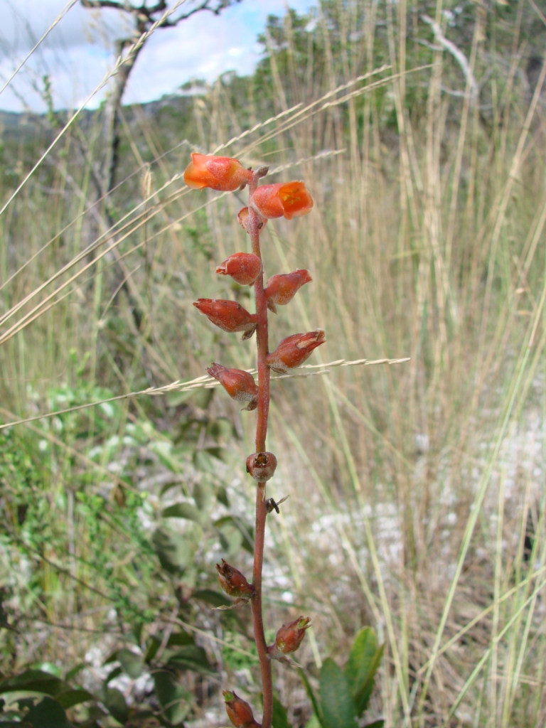 Dyckia trichostachya - BROMELIACEAE Parque Nacional da Chapada dos Veadeiros - Cavalcante - Goiás - Brasil.